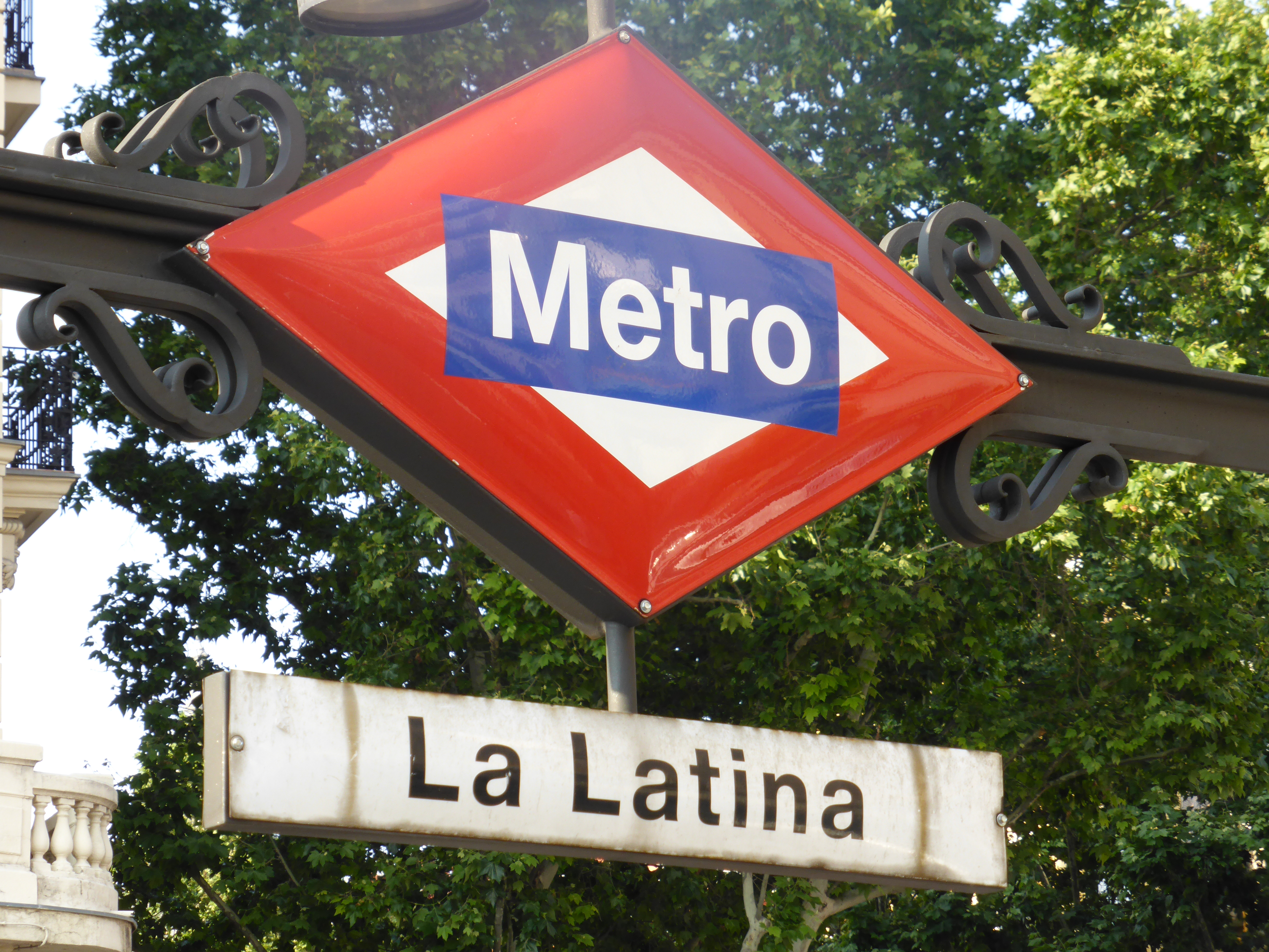 Cartel del Metro, de la estación "La Latina", en el exterior de una de sus bocas, en la calle Toledo, de Madrid. El nombre de "La Latina", de este barrio, es en recuerdo de Beatriz Galindo "La Latina", que fundó el antiguo Hospital de La Latina en 1499, así como los conventos de la Concepción Francisca y la Concepción Jerónima.